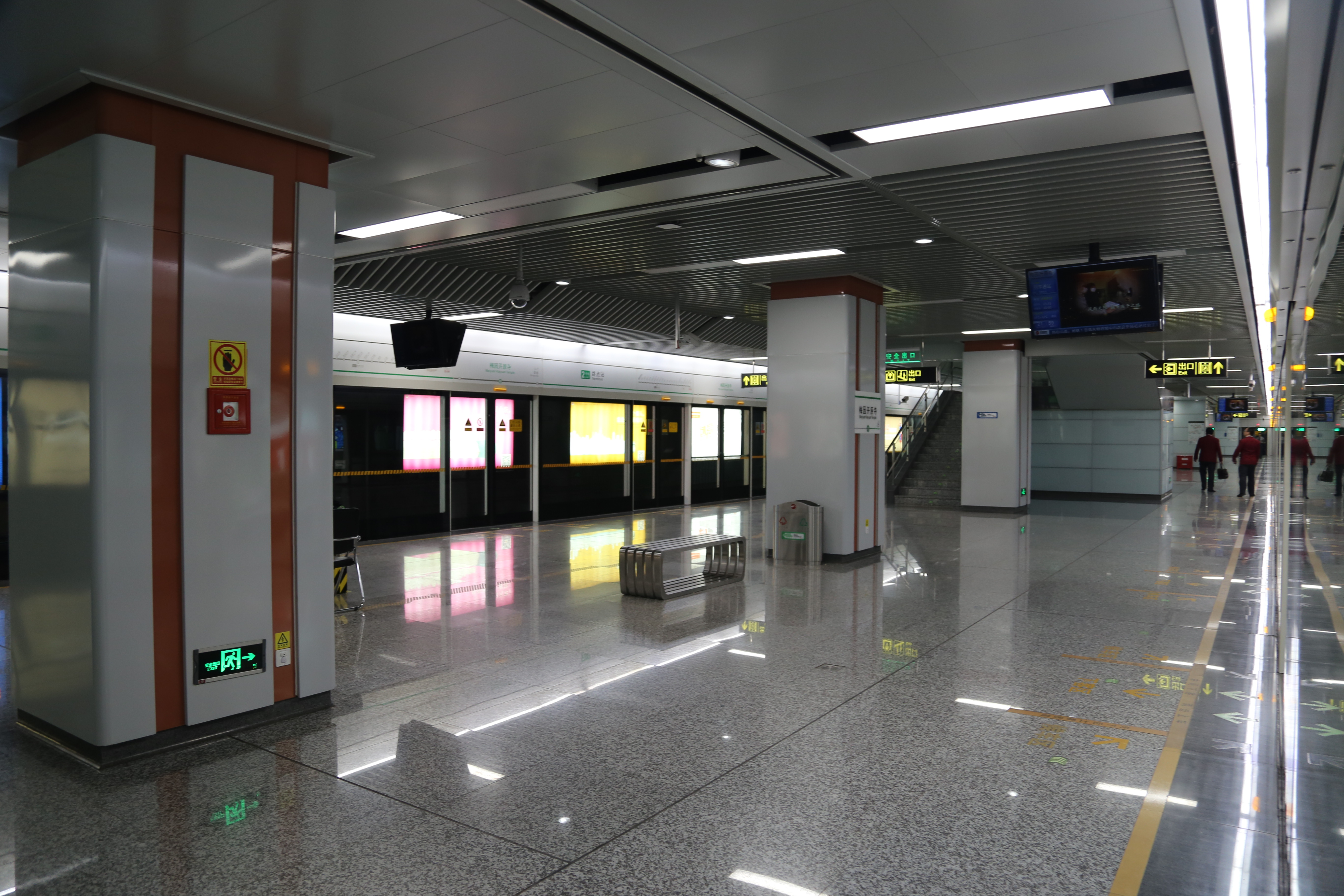 梅园开原寺站站台